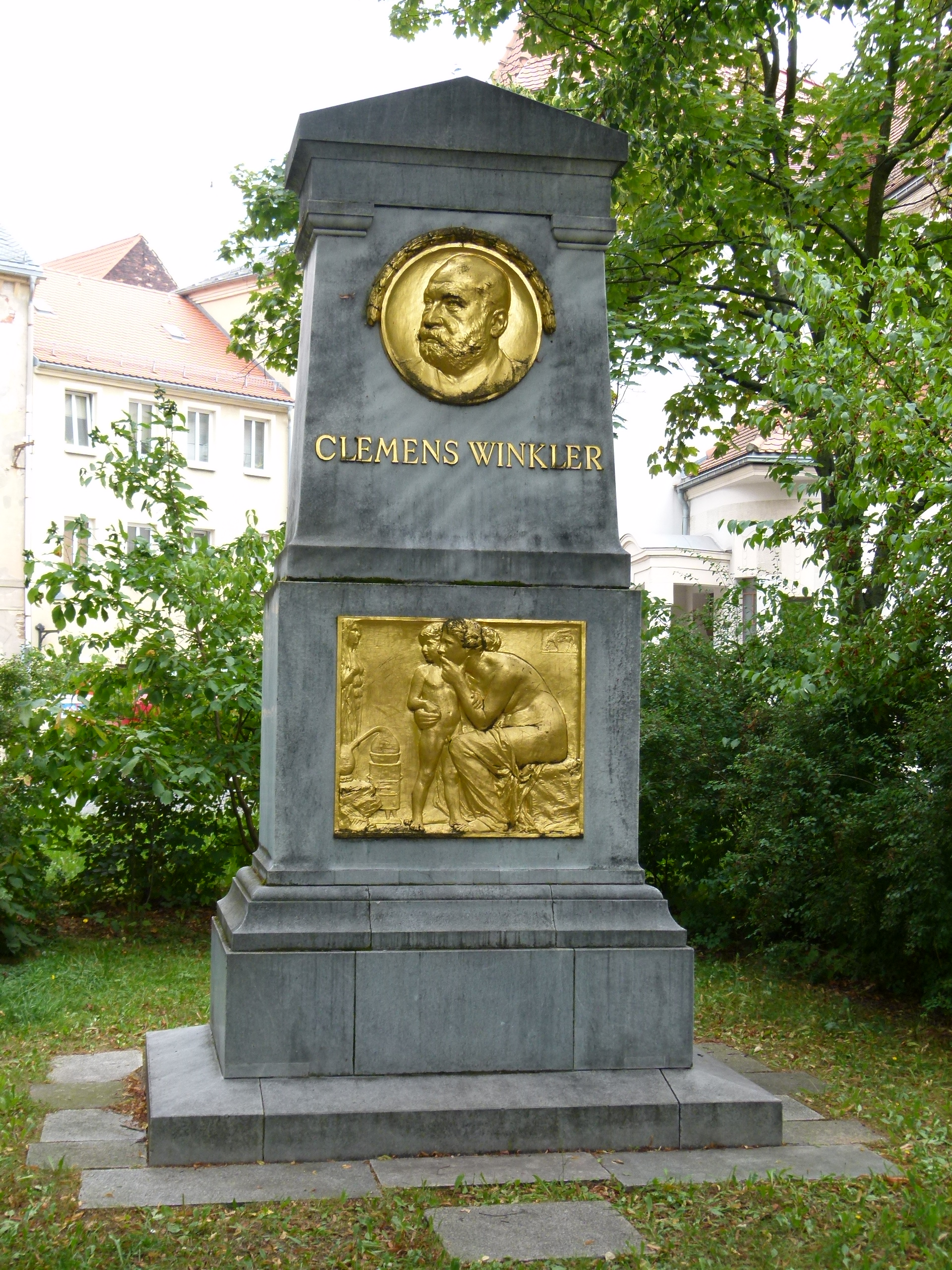 Clemens-Winkler-Denkmal, Wallstraße, Freiberg